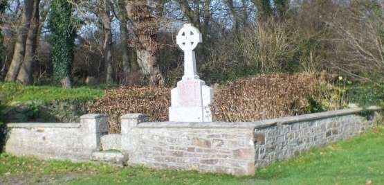 Lannilis : la stèle commémorative de Kerbabu.